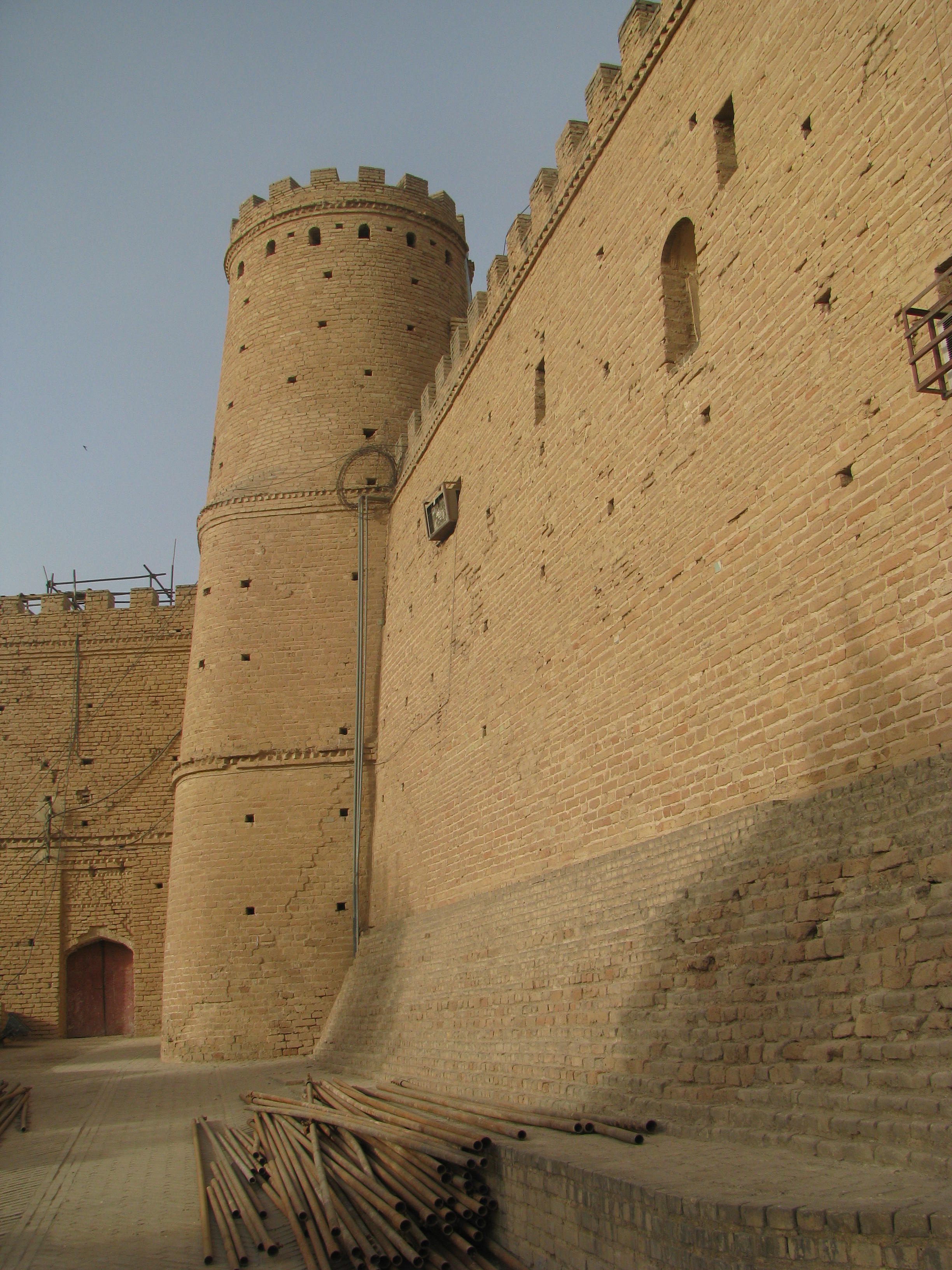 قلعه‌ی شوش